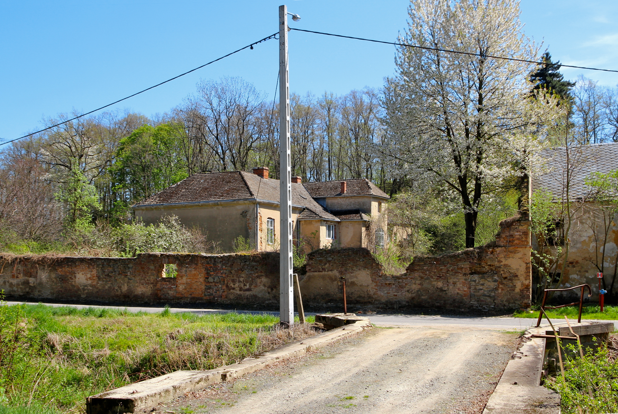 Pielgrzymów - wieś w Polsce położona w województwie opolskim, w powiecie głubczyckim, w gminie Głubczyce.